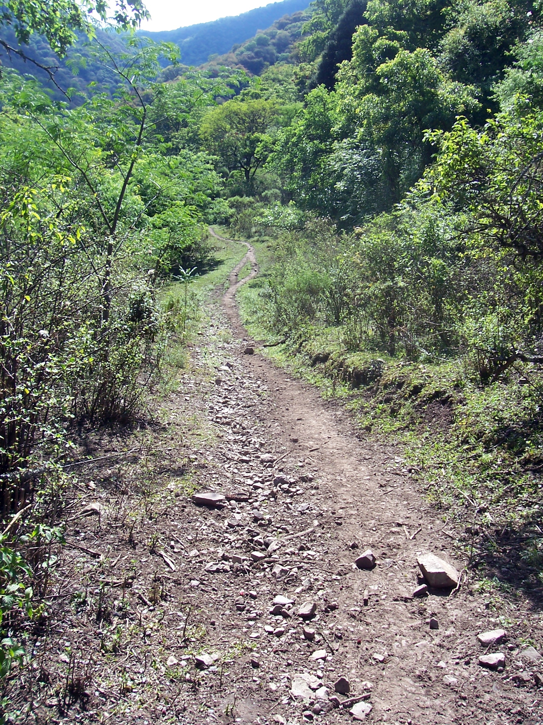 Sendero en Villa San Lorenzo, Salta